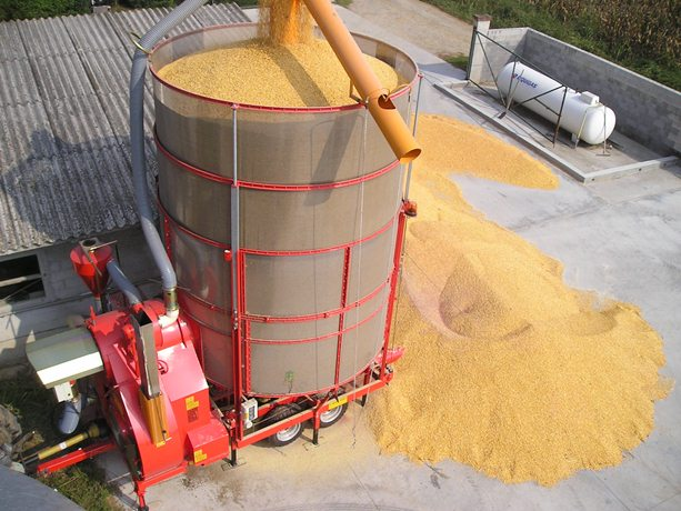 Мобильная зерносушилка Фрателли Педротти